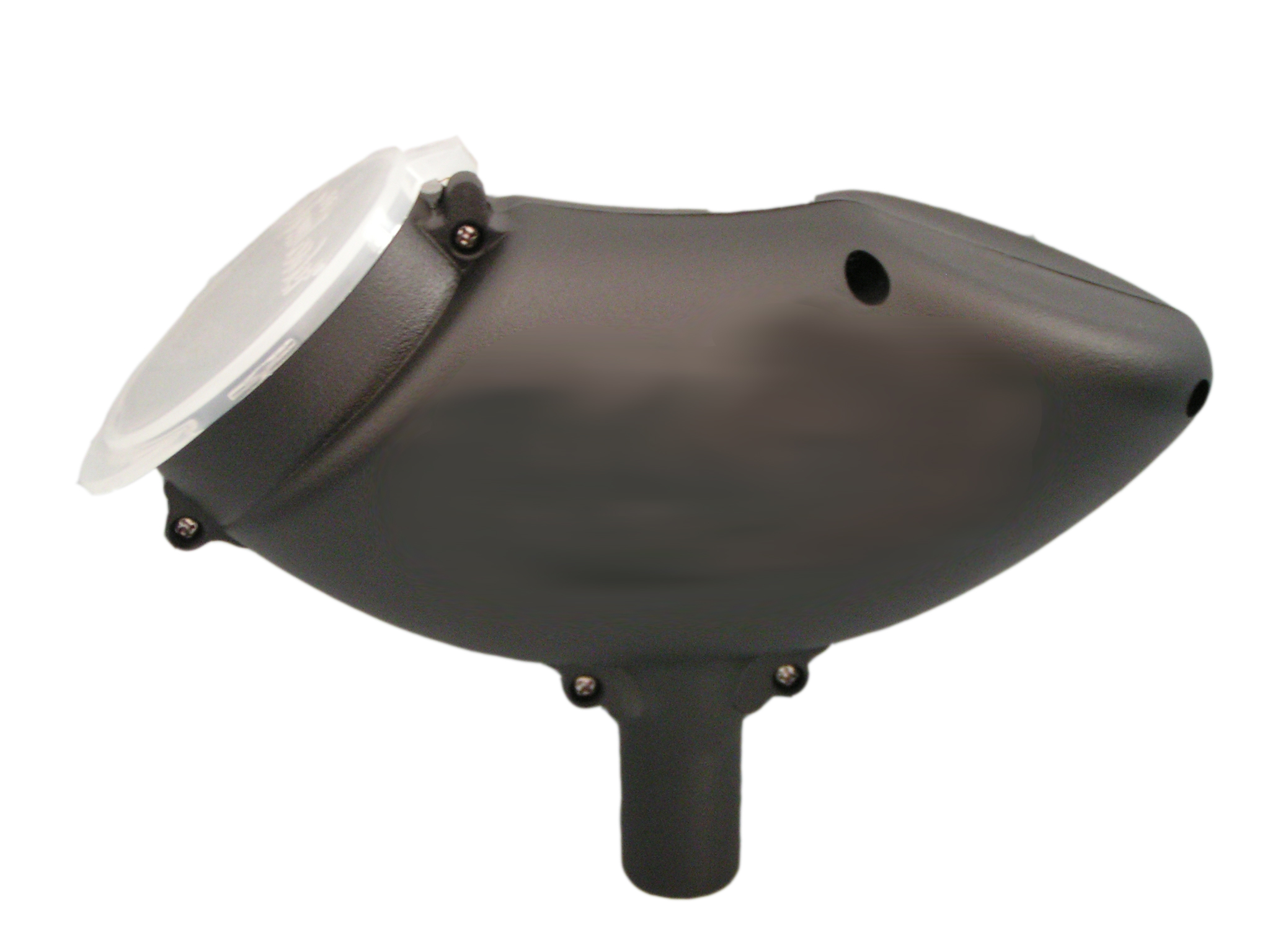 Paintball Hopper seitlich